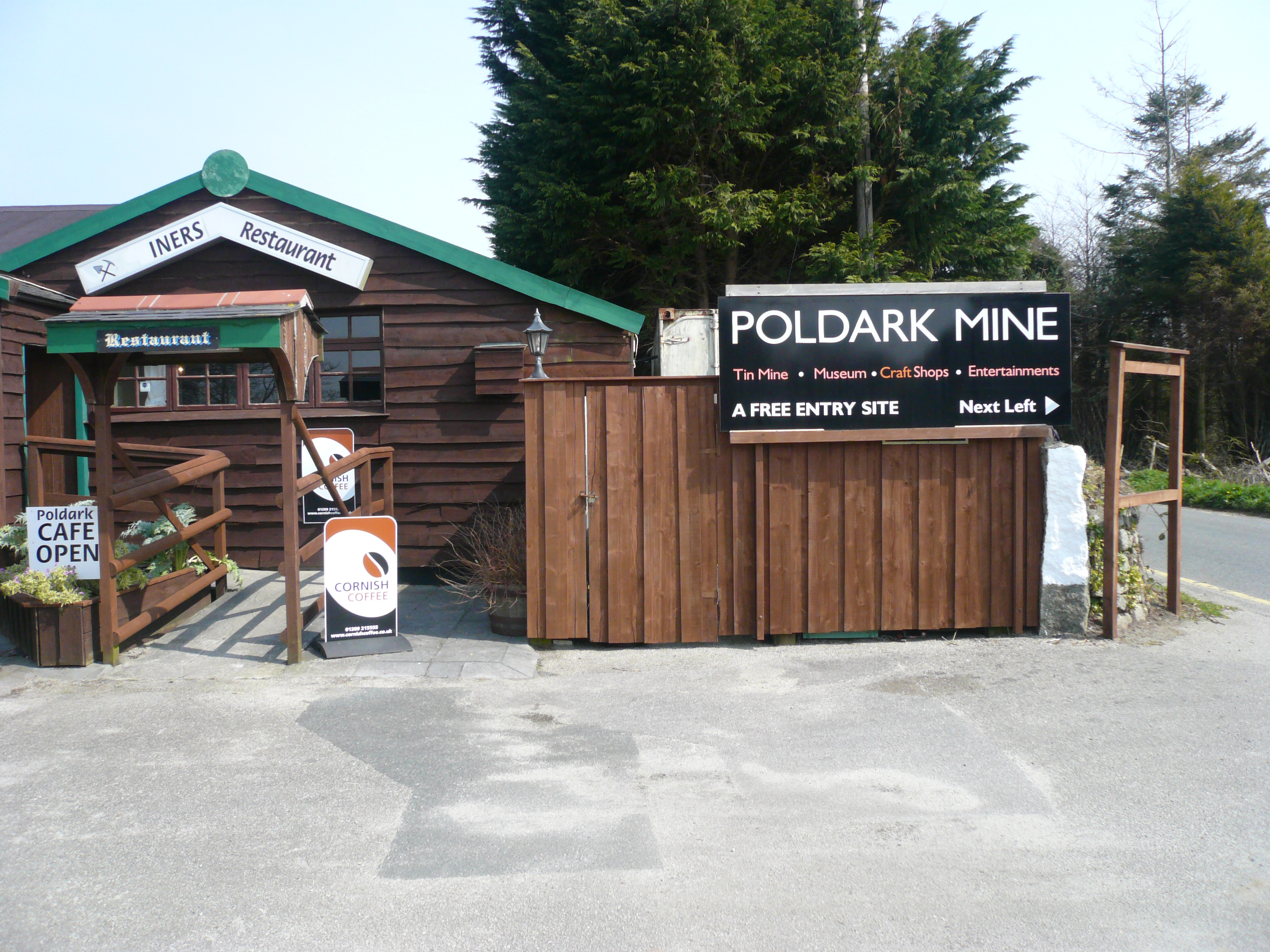 Poldarkmine